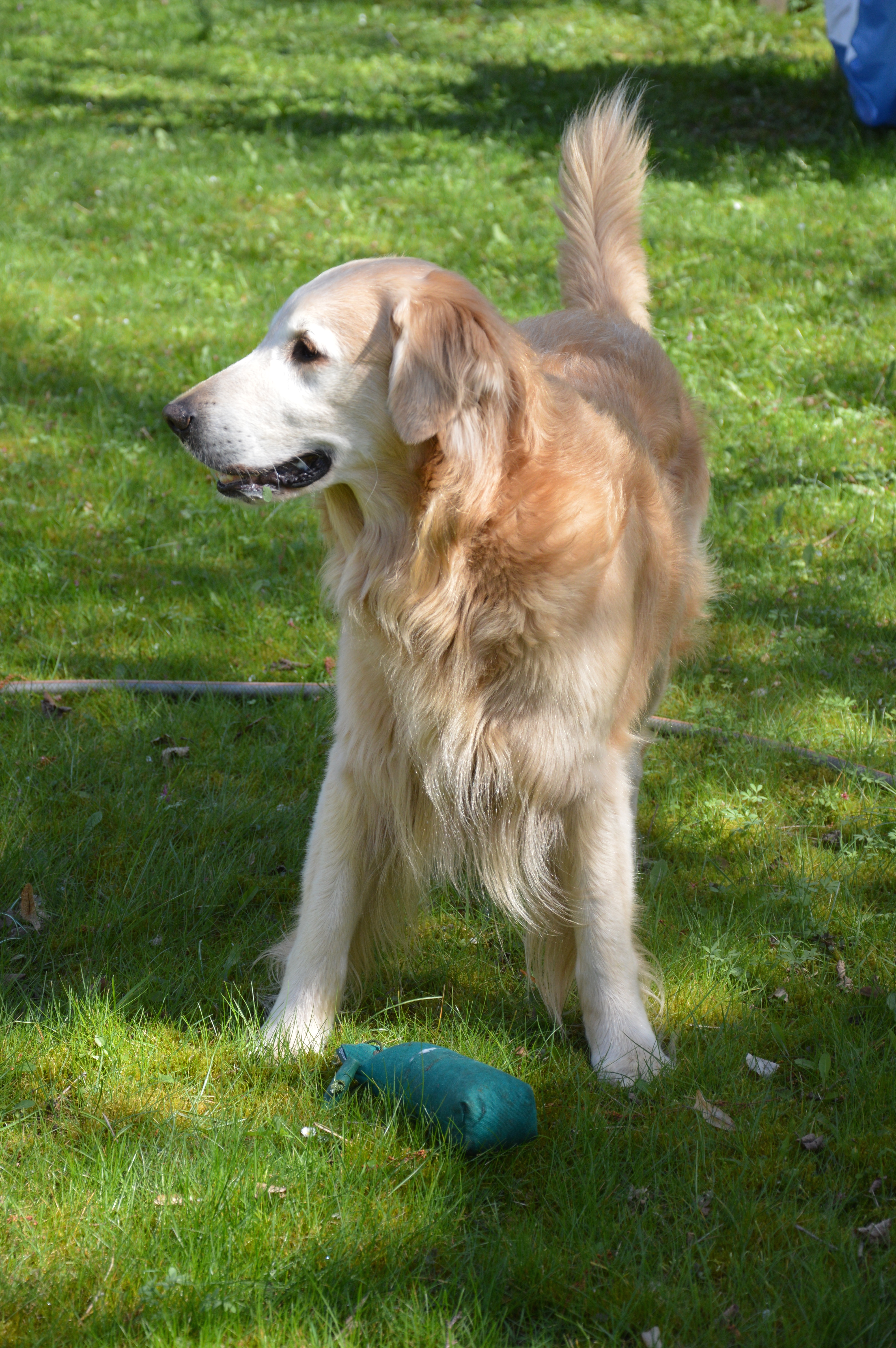 Yellow Flat Coated Retriever